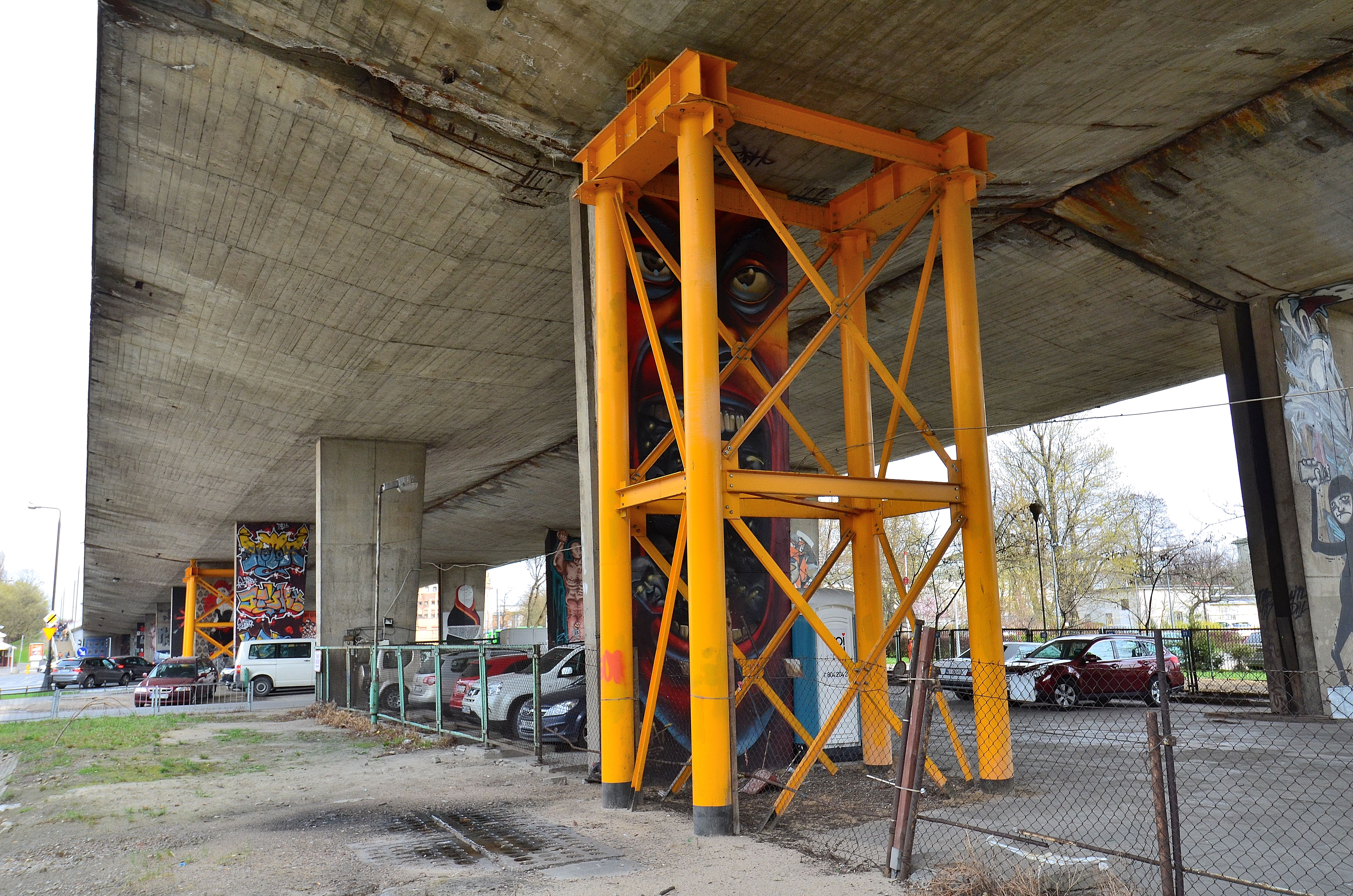 Wzmocnienie wiaduktu Trasy Łazienkowskiej nad Parkiem Agrykola, widok od strony ulicy Myśliwieckiej